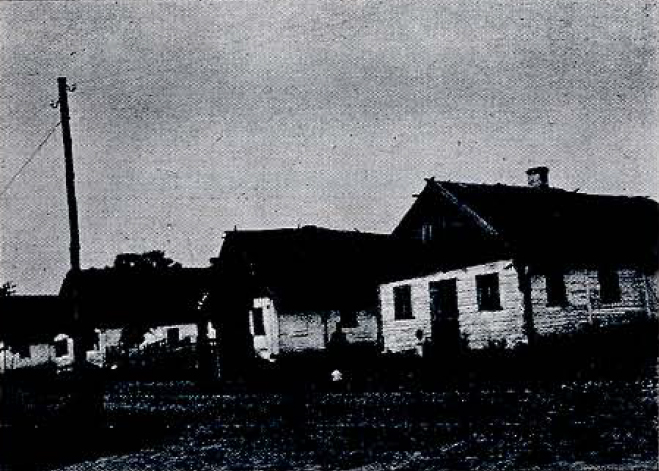 Беларуская (тарашкевіца): Забалаць (Zabałać)